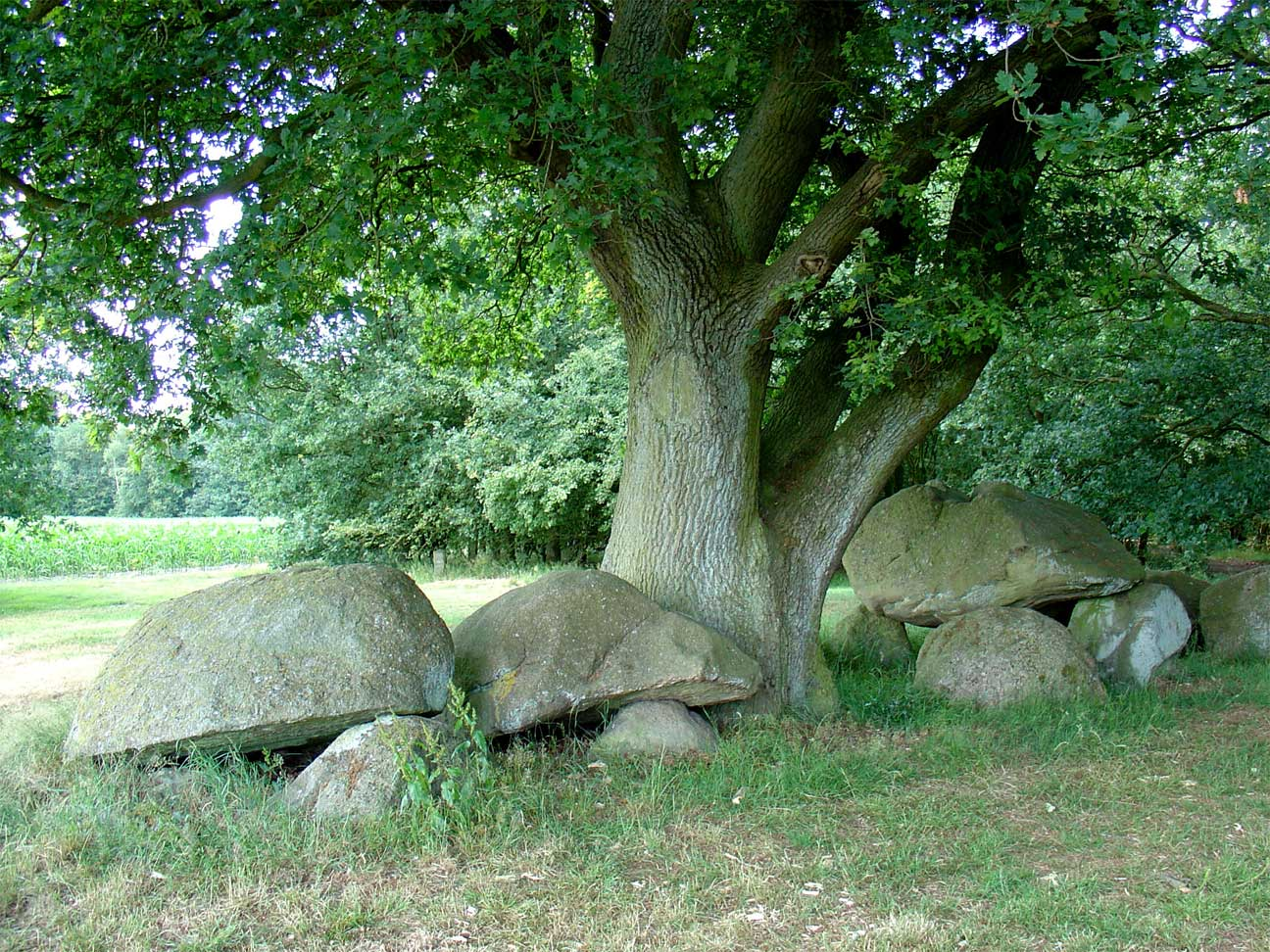 Hunebed D42 op de Schimmer esch bij Emmen